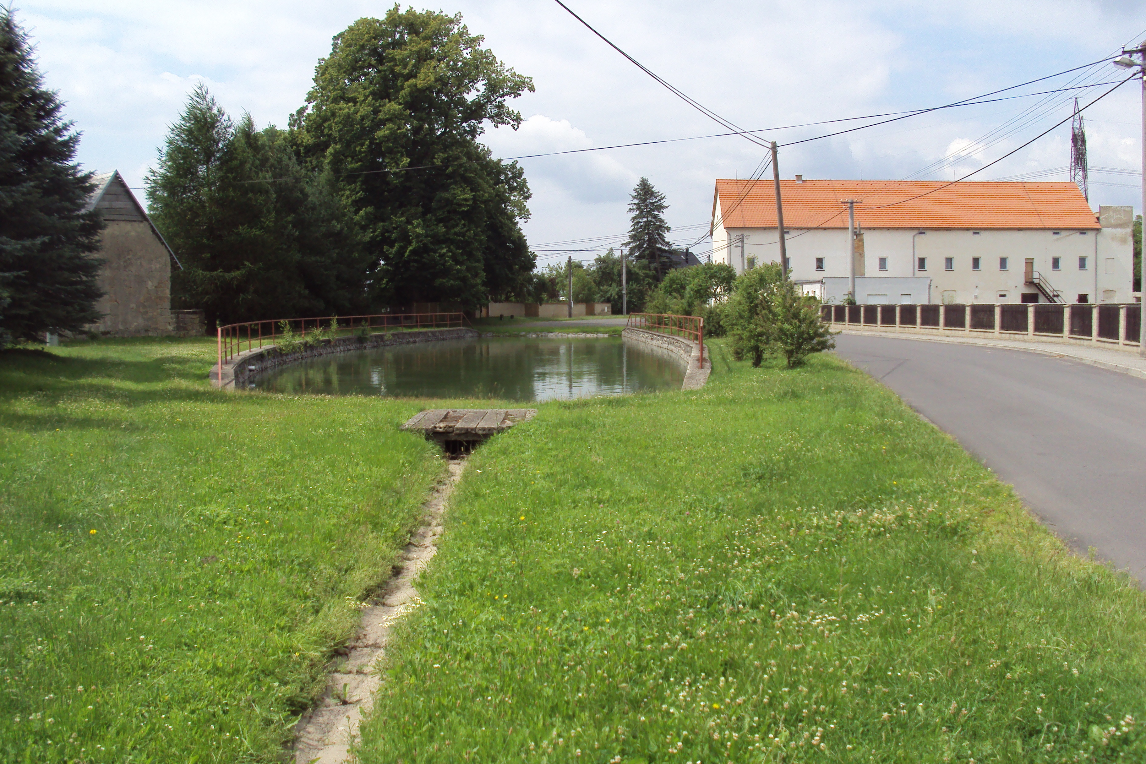 Skalka je obec u Blíževedel. Rybníček ve vesnici, v pozadí lípa velkolistá, pozůstatlá polovice památných stromů Skupina ve Skalce